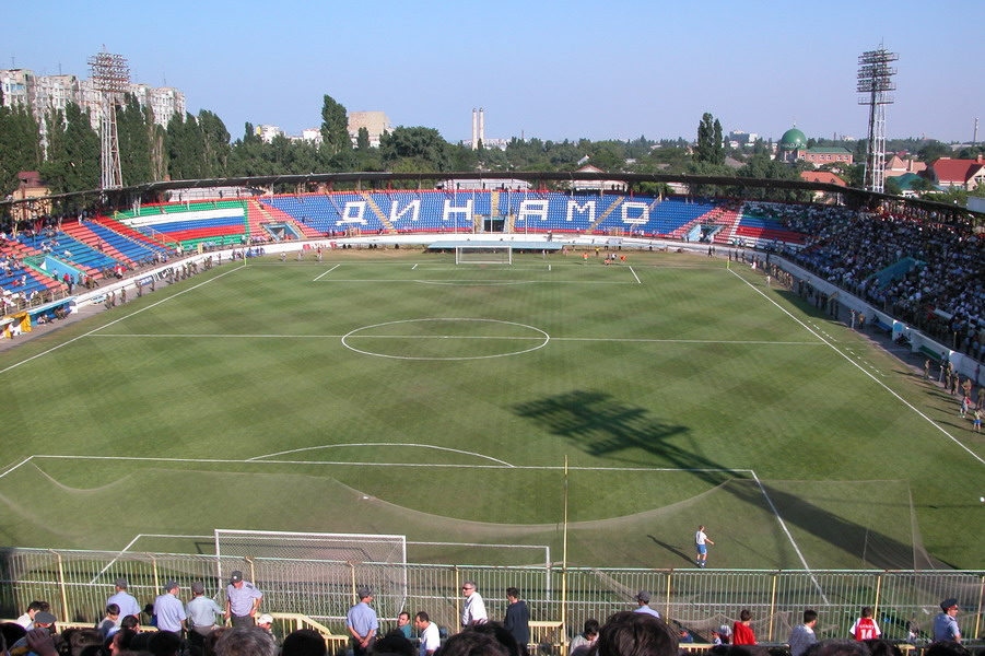 Фотография Стадиона Динамо в Махачкале